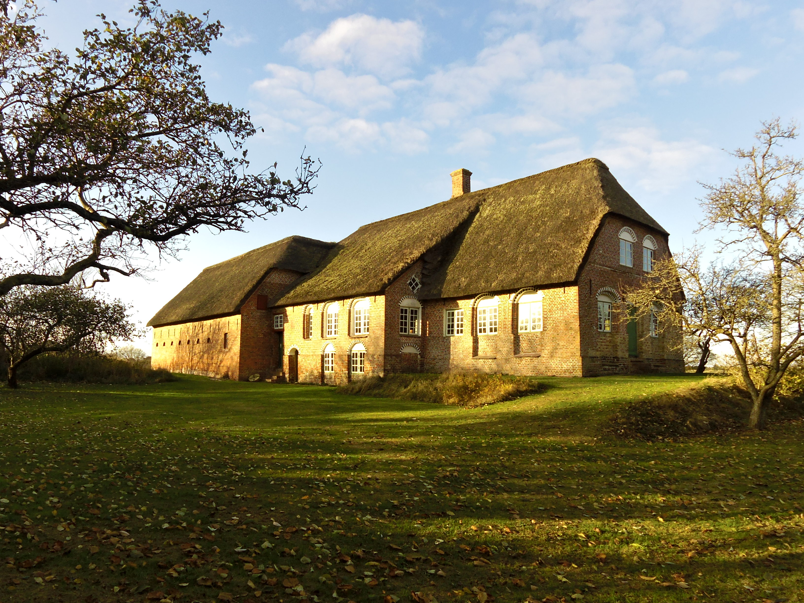 Kommandørgården